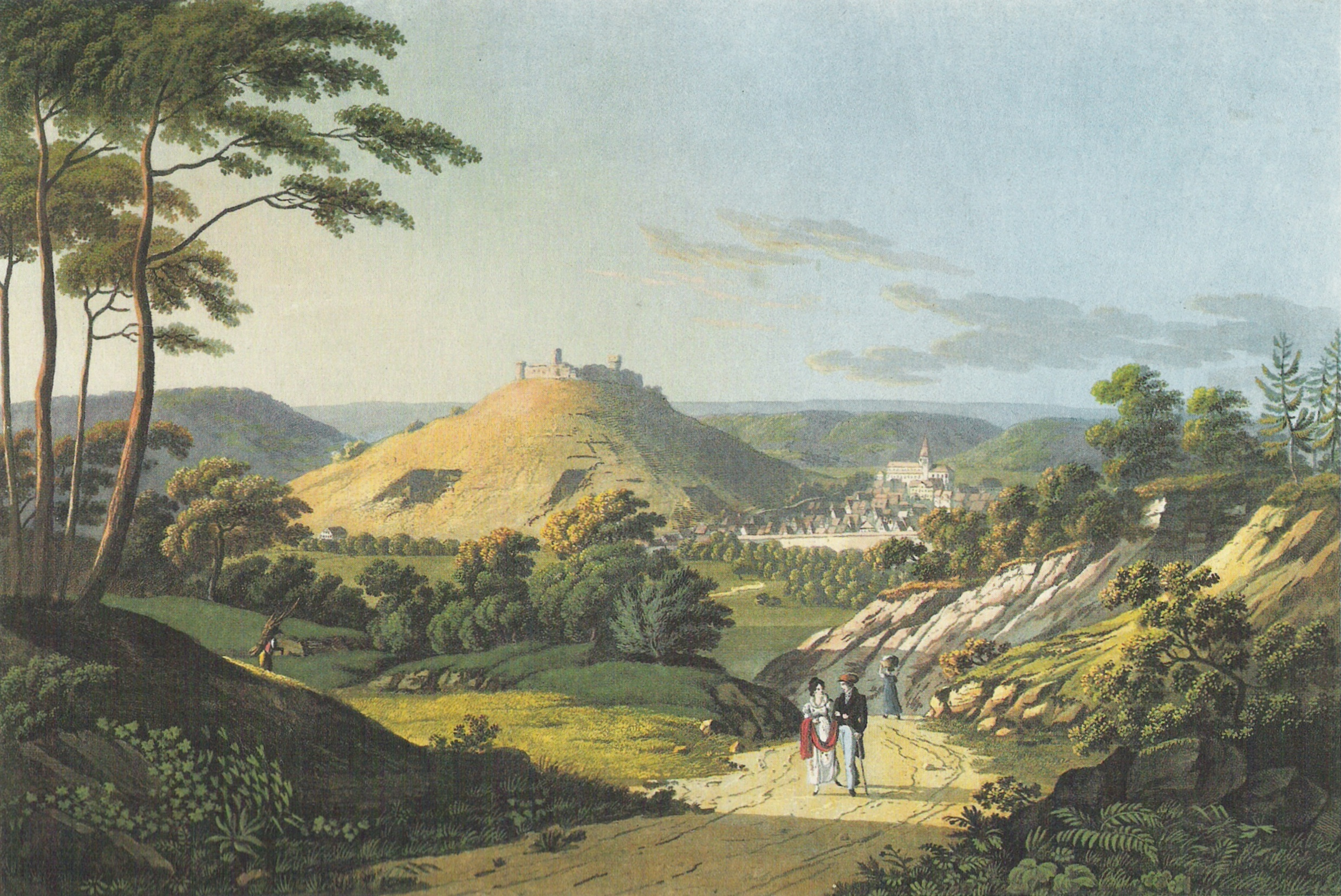 Weinsberg und die Weibertreu von Südwesten. Kolorierte Radierung, um 1820